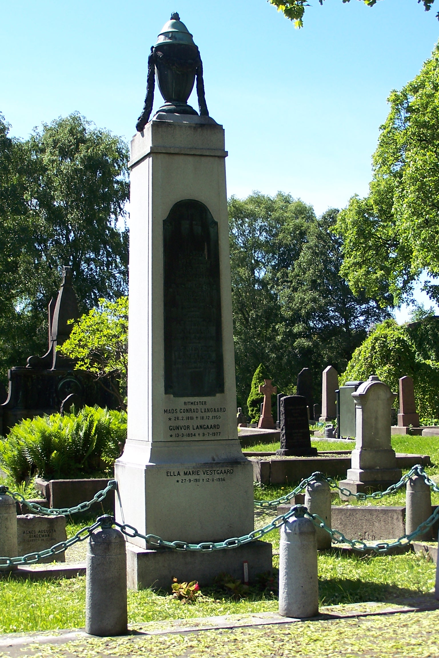 Tomb of Langaard family at Vår Frelsers gravlund, Oslo